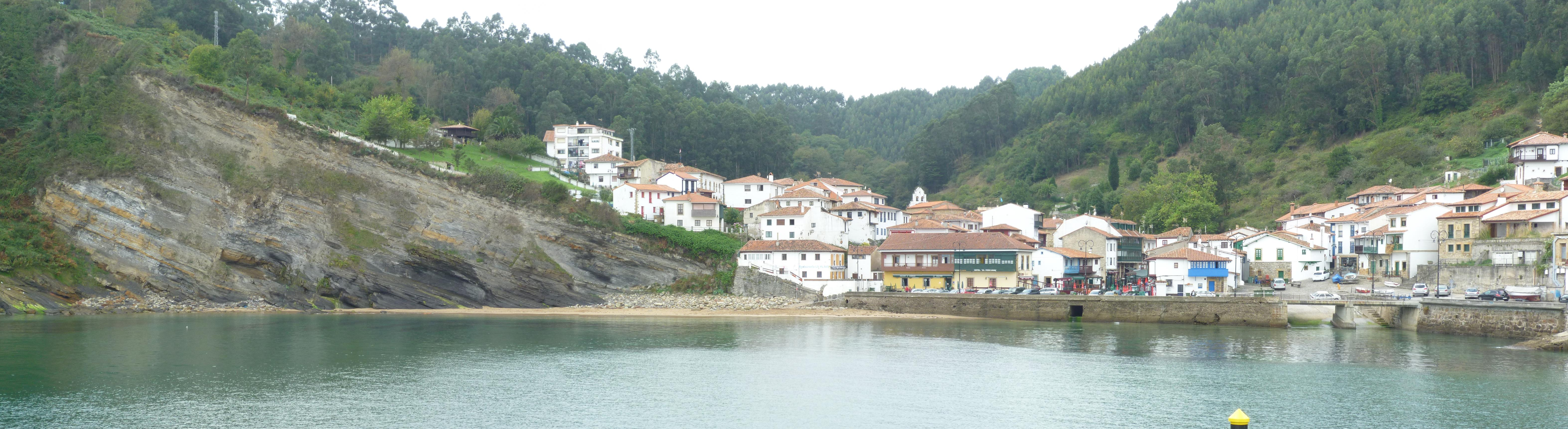 Tazones